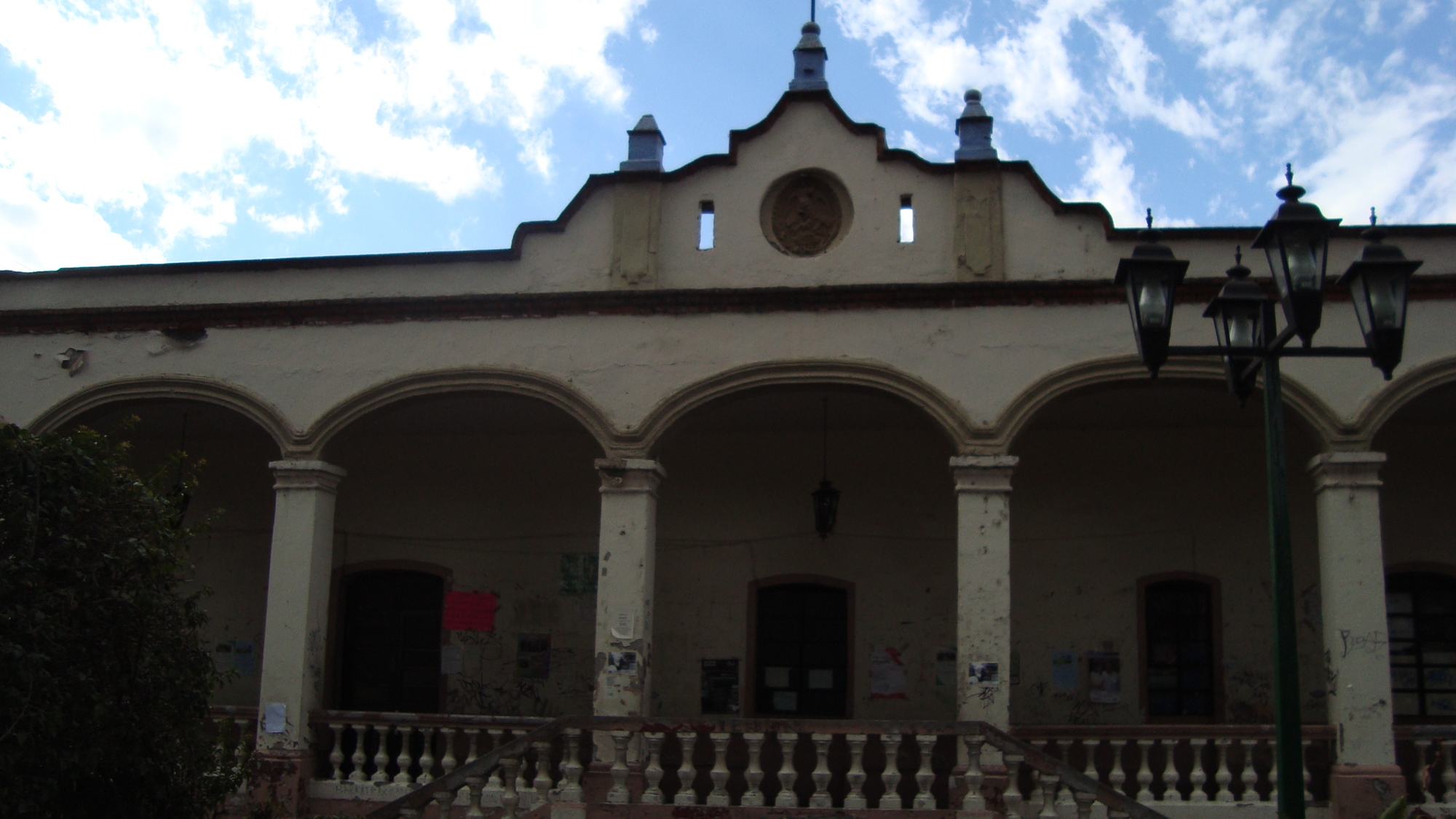 Edificio del antiguo Ayuntamiento de Tláhuac, en el centro de San Pedro Tláhuac (México). Actualmente sigue en funciones administrativas pero su grado de deterioro es evidente.